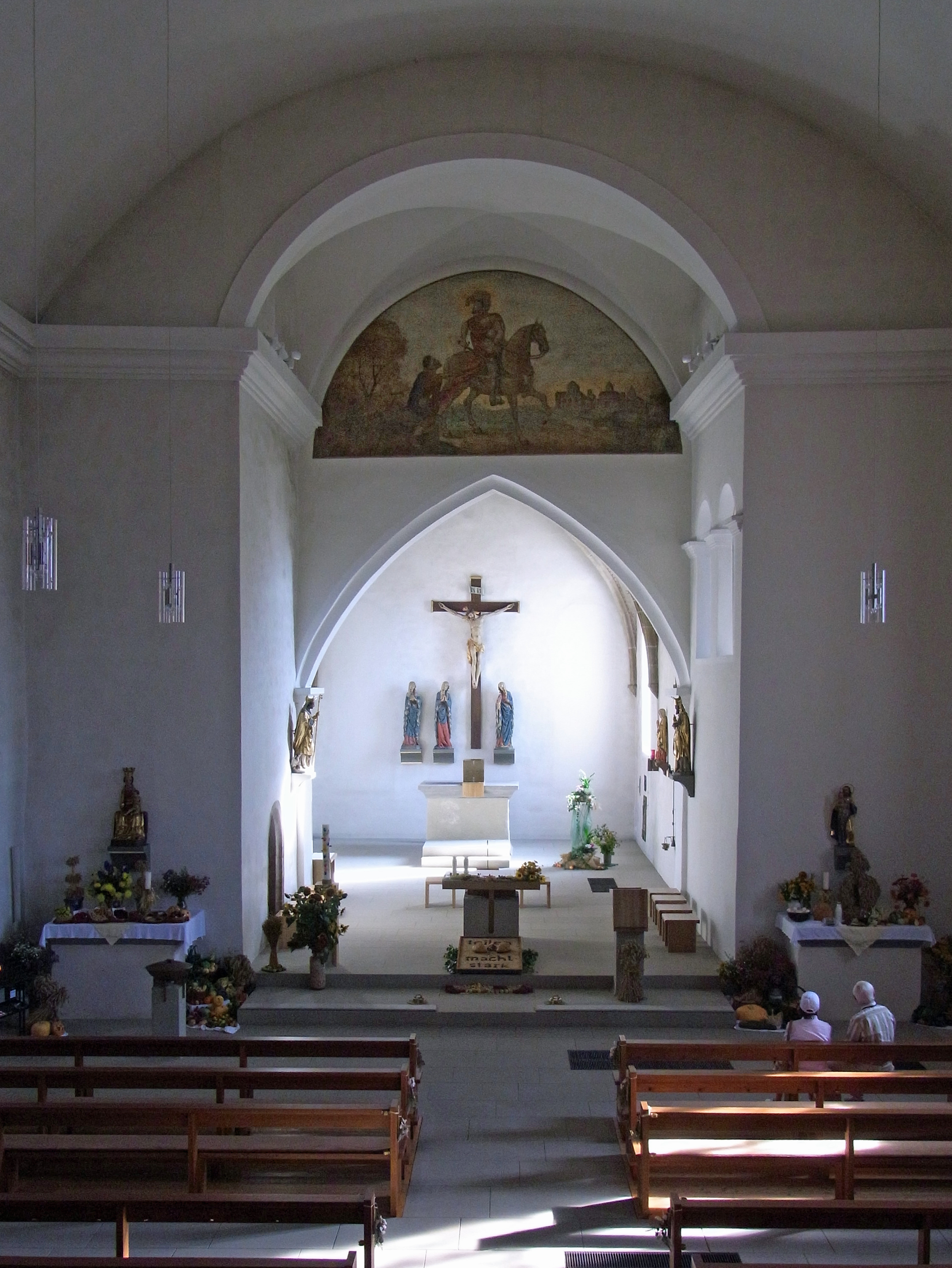 Trochtelfingen: Pfarrkirche St. Martin